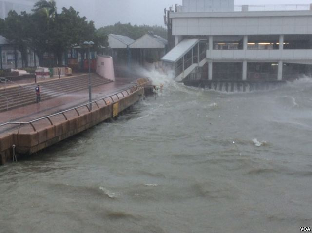 2018年9月16日，颱風山竹帶來的風浪潮使維港海水水面上升